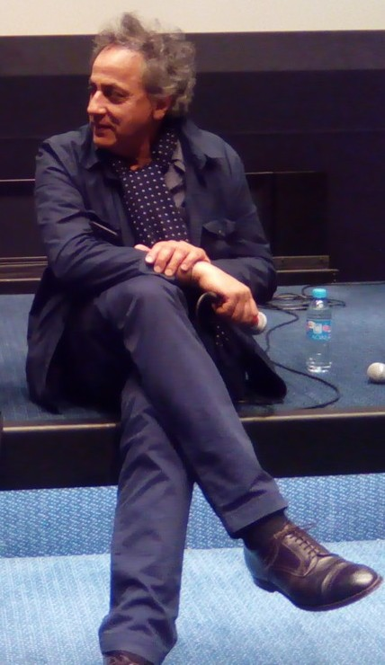 Darius Khondji à la projection du film "Le Trésor des îles Chiennes", à la cinémathèque française.